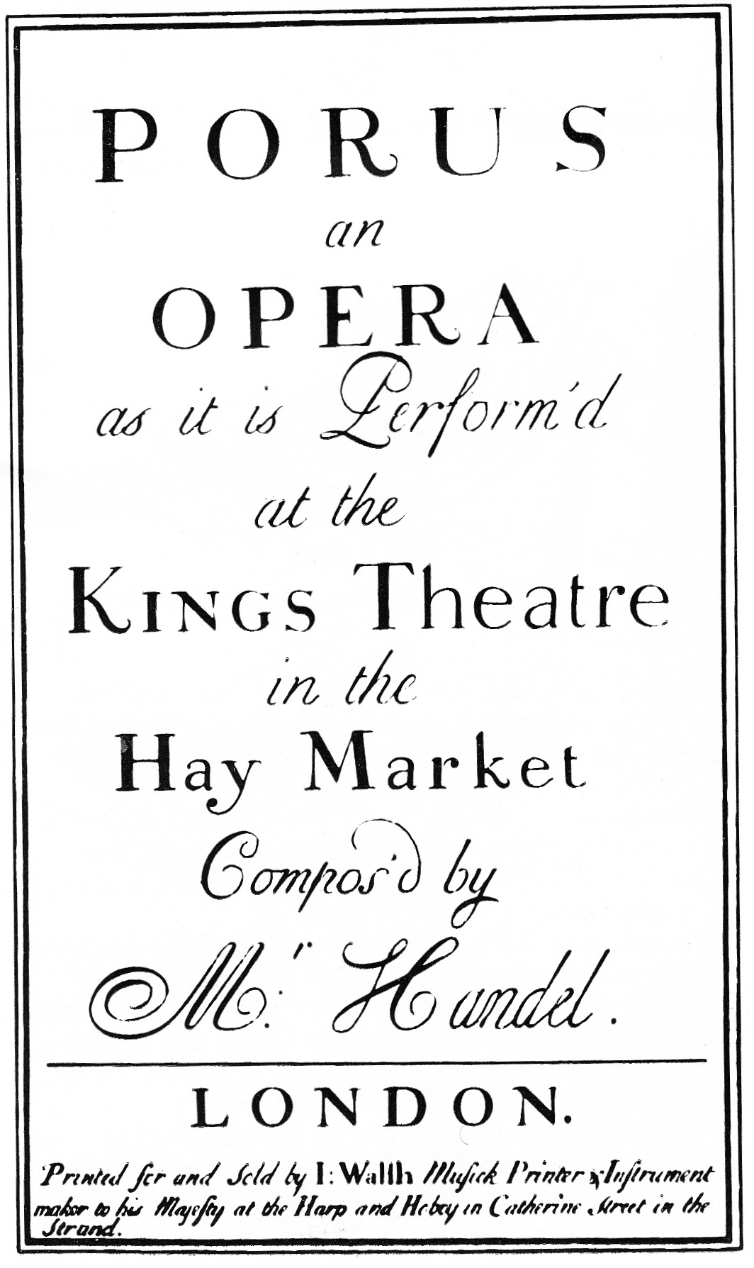 Poro: Titelseite des Erstdruckes der Arienpartitur von John Walsh,1731